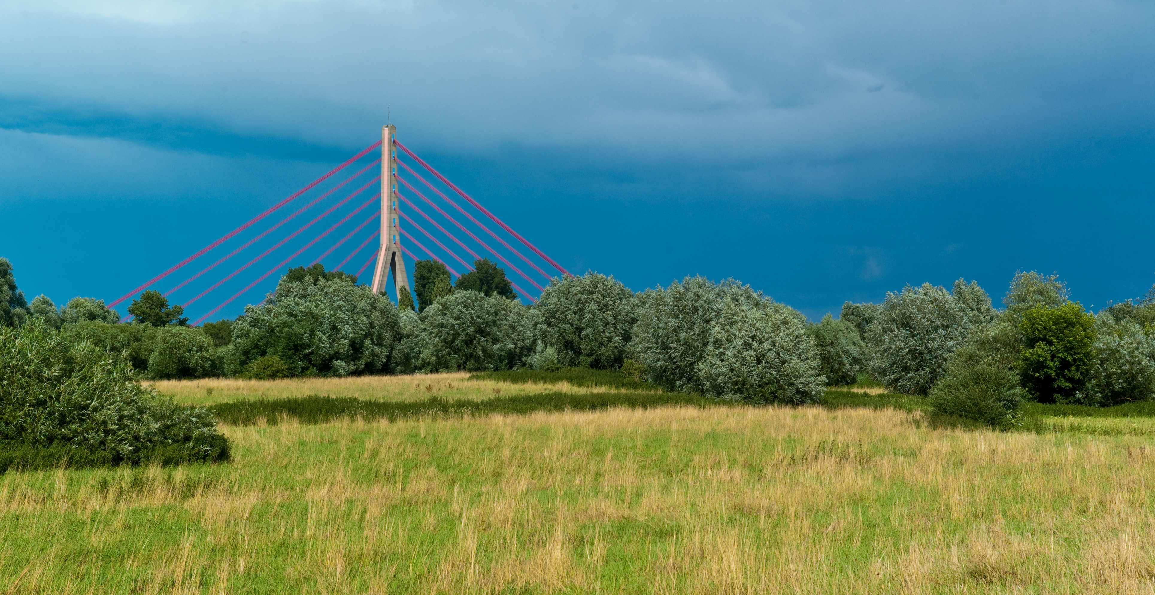 Die Uedesheimer Rheinaue in Grimlinghausen. Im Hintergrund die Fleher Brücke.